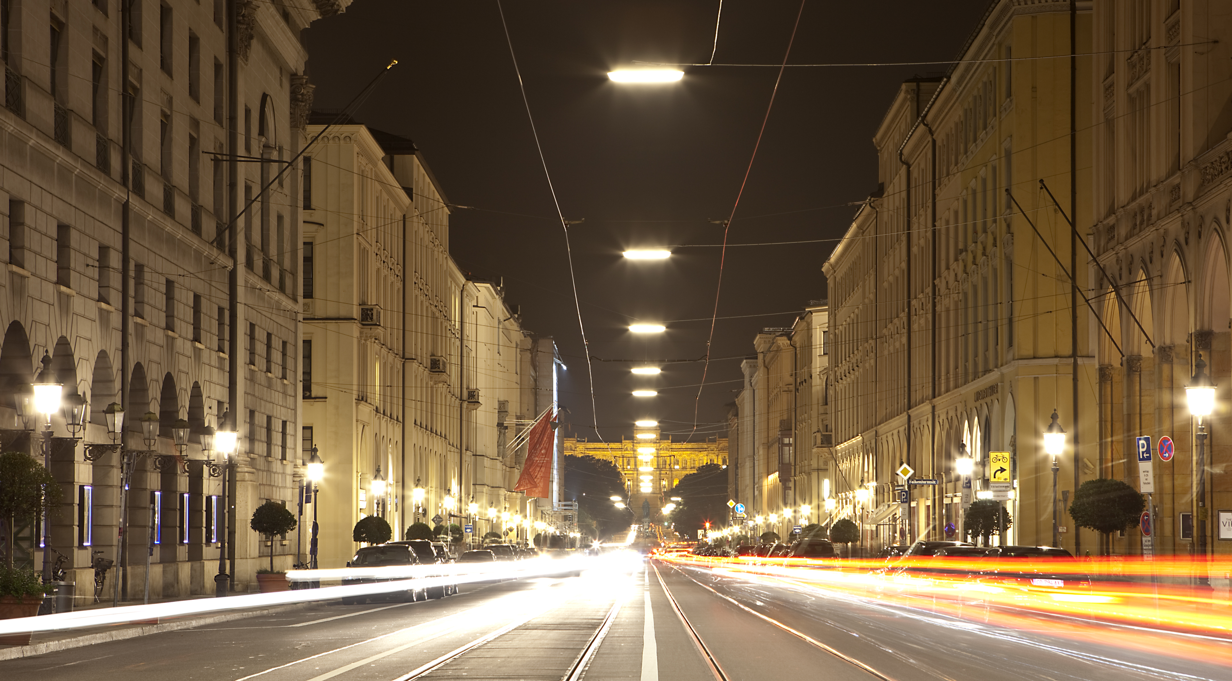 Maximilanstraße bei Nacht mit Blick auf das Maximilianeum. LangzeitbelichtungThis is a photograph of an architectural monument.